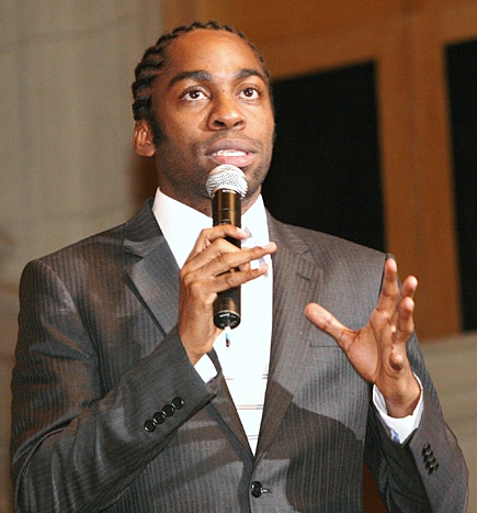 Lázaro Ramos foi o apresentador da 5º edição do prêmio BRAVO! Prime de Cultura de 2009.